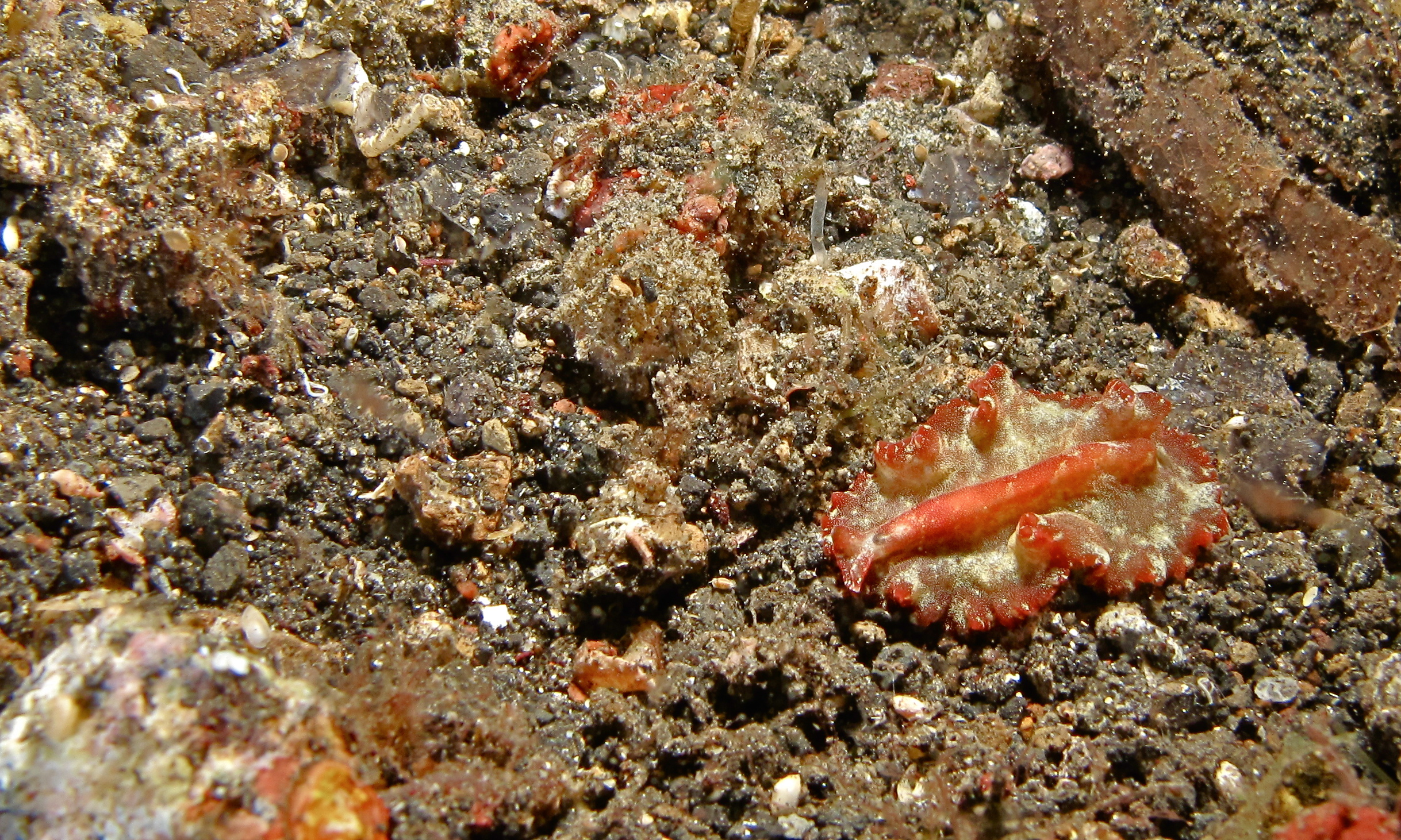 Jahir, Lembeh Strait, Sulawesi, INDONESIA